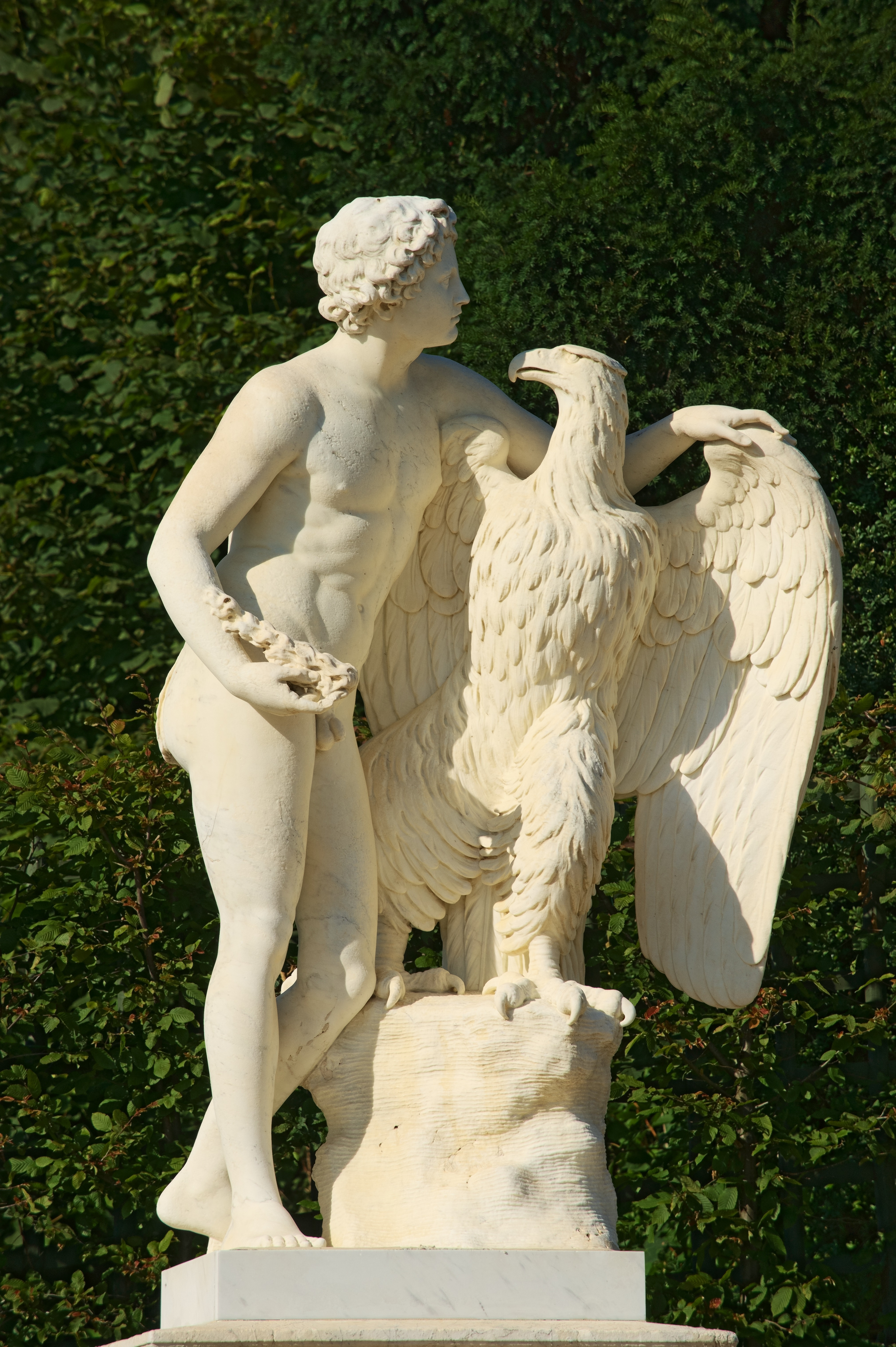 Ganymède par Pierre Laviron (1650-1685) - Parc de Versailles, rampe nord de Latone.